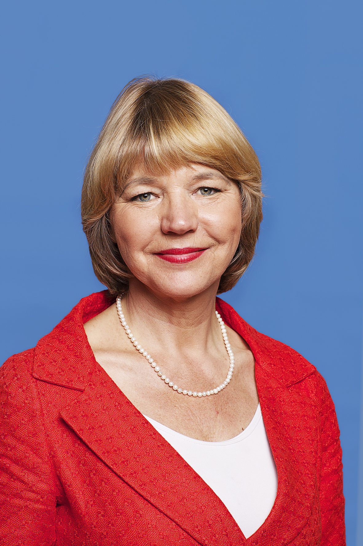 Désirée Bonis, Kandidaat-Kamerlid. Foto: Lex Draijer.